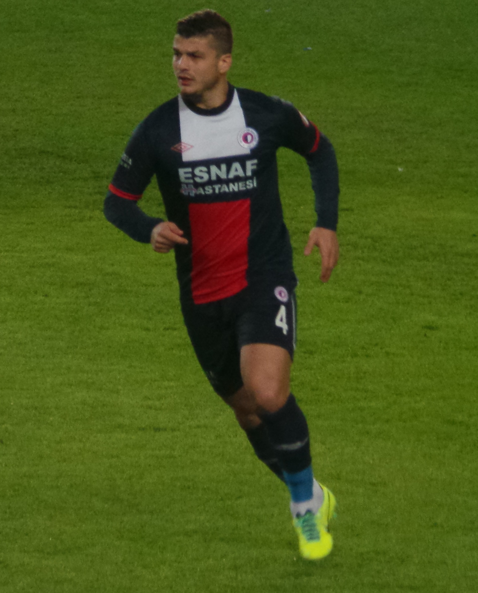 Birol Parlak Fenerbahçe maçında